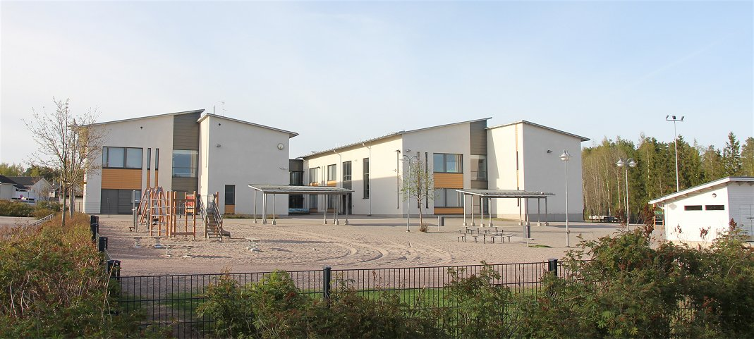 Ylästön koulu koulupihan suunnasta. Ylästön koulu on Vantaan Aviapoliksen suuralueen Ylästön kaupunginosassa sijaitseva suomenkielinen alakoulu. Koulua on tarkoitus laajentaa yhtenäiskouluksi rakentamalla Ylästön yläkoulu vuosina 2018-2019.